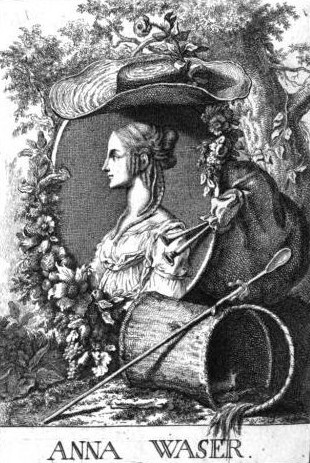 Portrait der Schweizer Malerin Anna Waser.